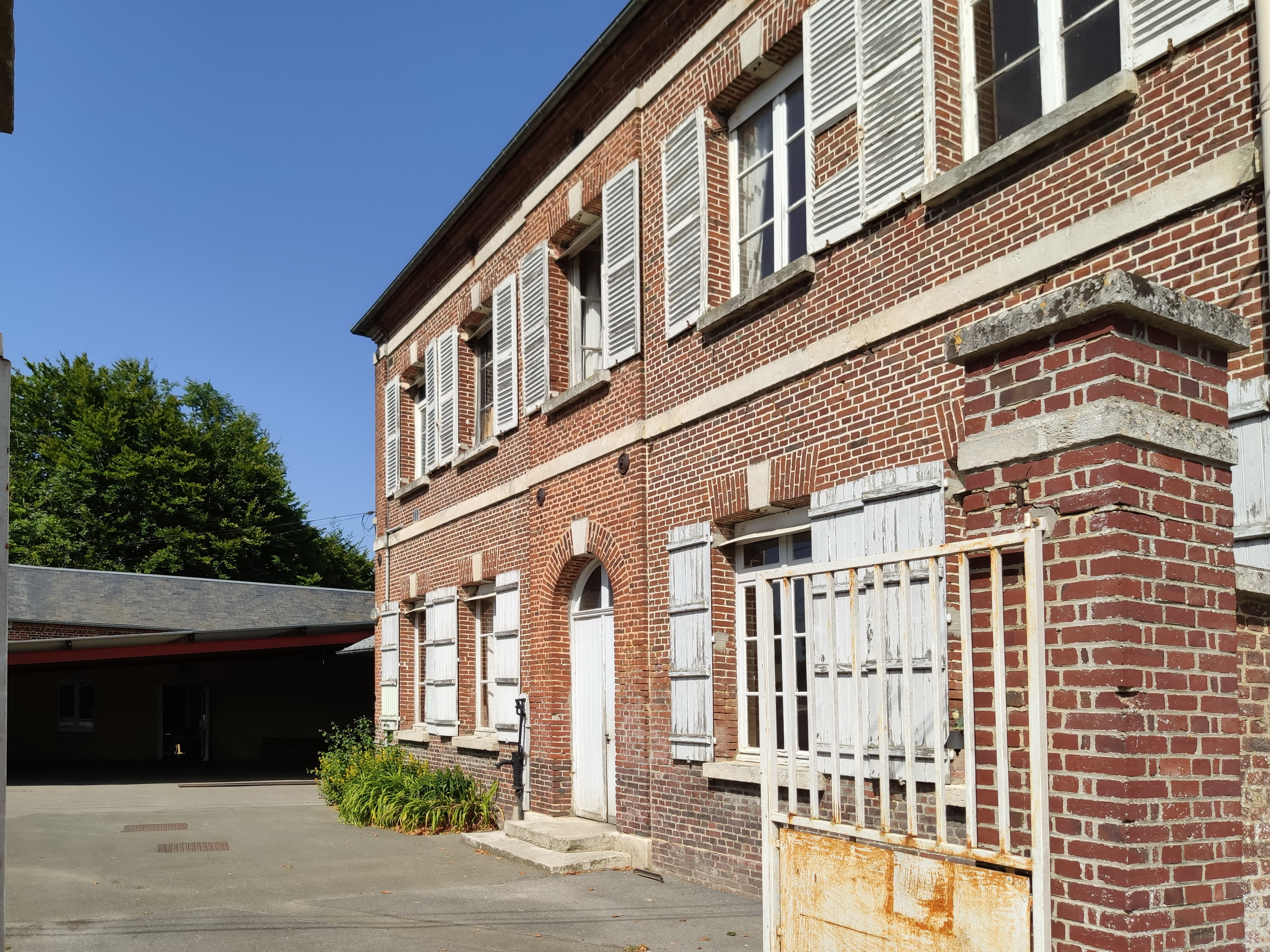 Fontaine-Bonneleau : La mairie école, côté école